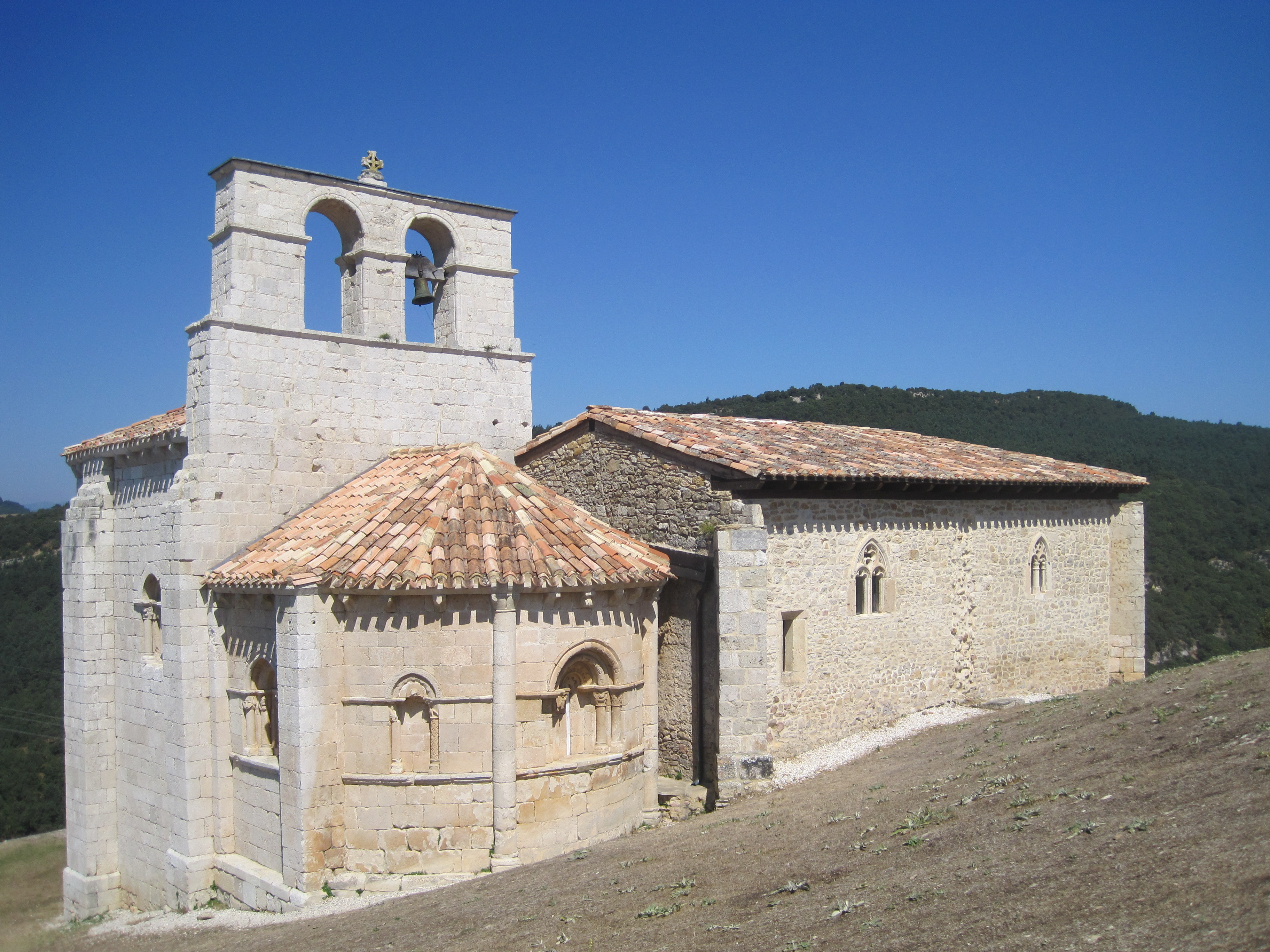 Vista exterior de la Ermita de San Pantaleón de Losa.